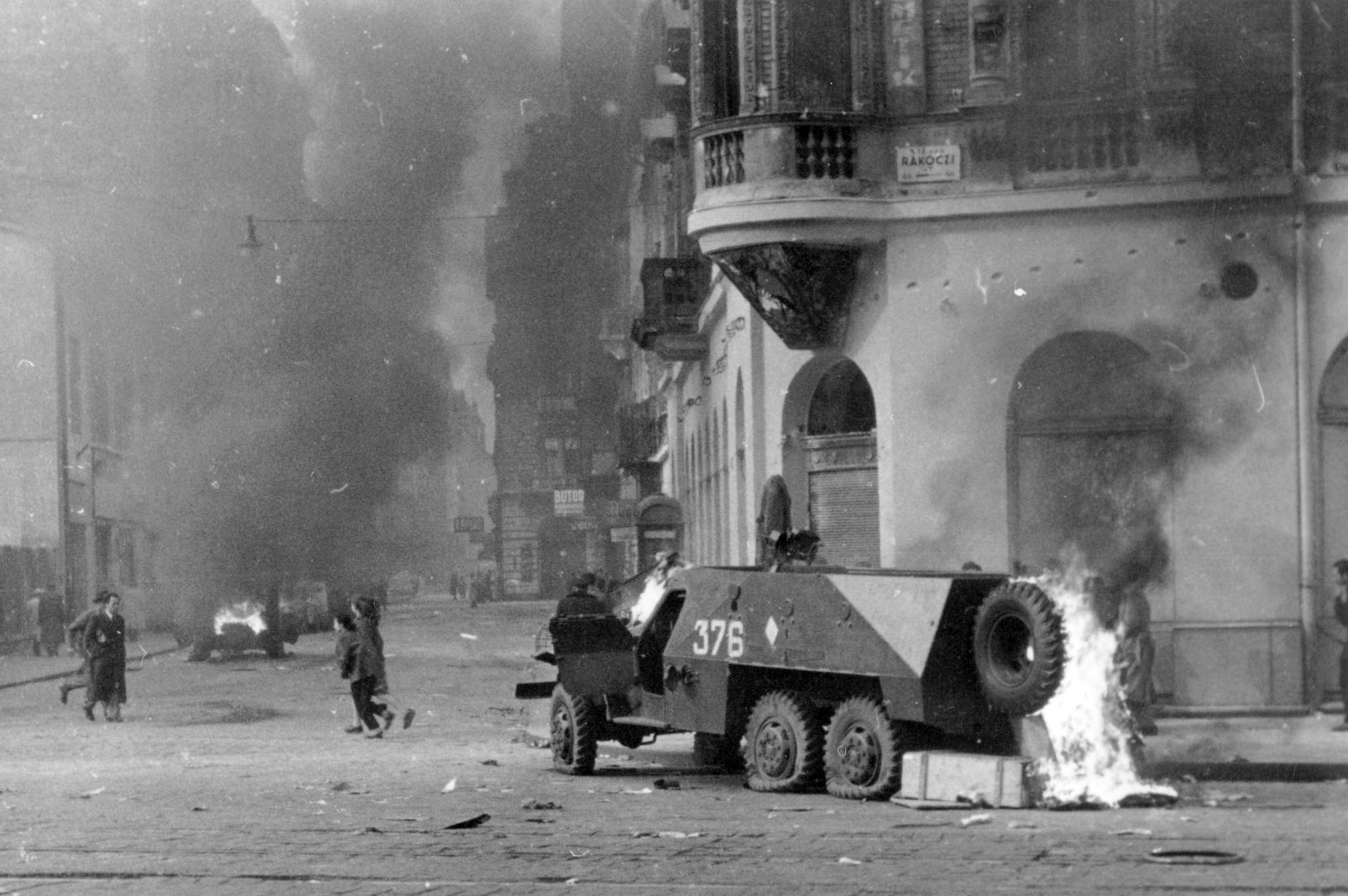 Rákóczi út - Akácfa utca sarok. Kiégett szovjet BTR-152 páncélozott lövészszállító jármű. Location: Hungary, Budapest VII. Tags: revolution, armoured car, wreck, smoke, pedestrian, street view, combat vehicle, Budapest, fire Title: Rákóczi út - Akácfa utca sarok. Kiégett szovjet BTR-152 páncélozott lövészszállító jármű.